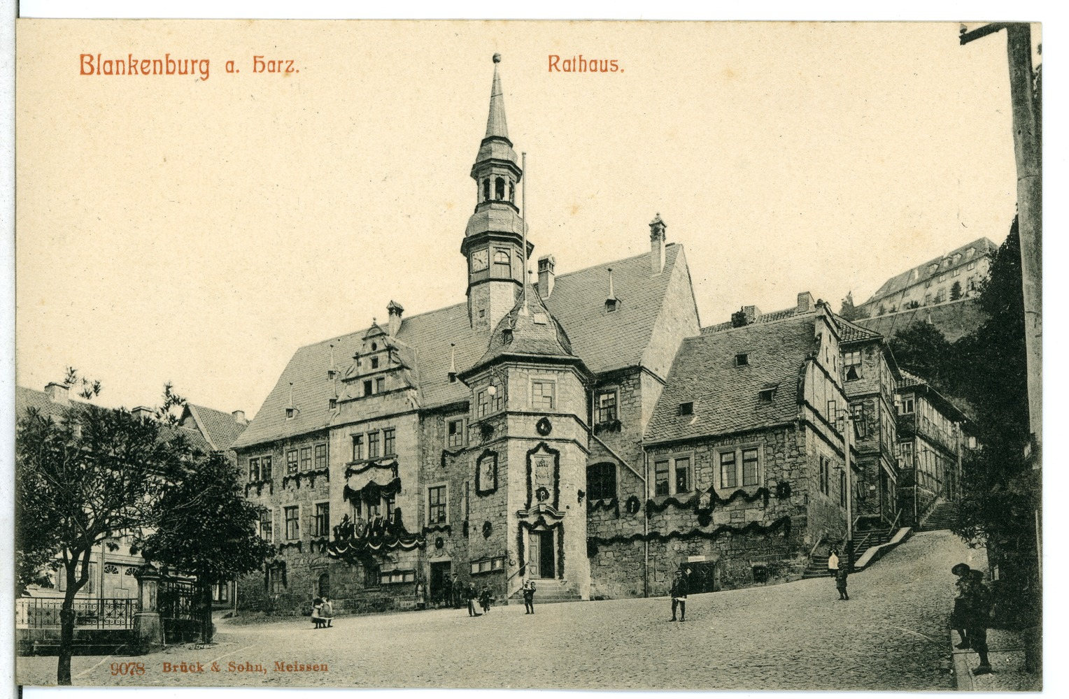 Blankenburg; Rathaus This postcard is from publisher Brück & Sohn in Meißen ( postcard has a unique number 09078 and is available in a higher resolution at the publisher. This images was uploaded in a cooperation project between Wikipedians and the publisher.